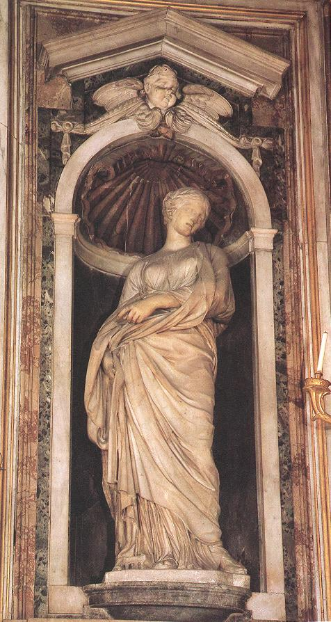 Santa Susana, basílica de Loreto